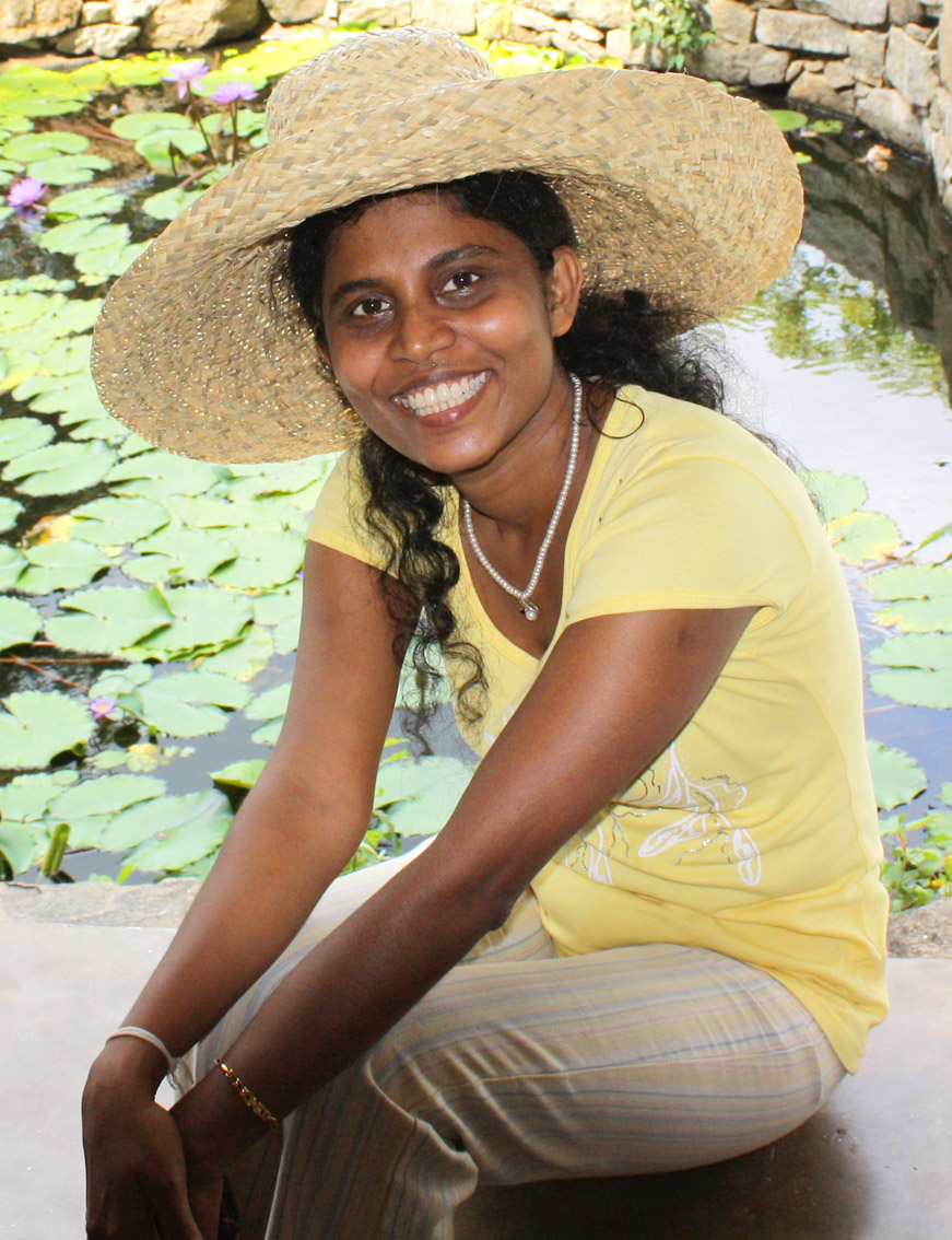 Сингалка Sri_Lanka Шрі-Ланка